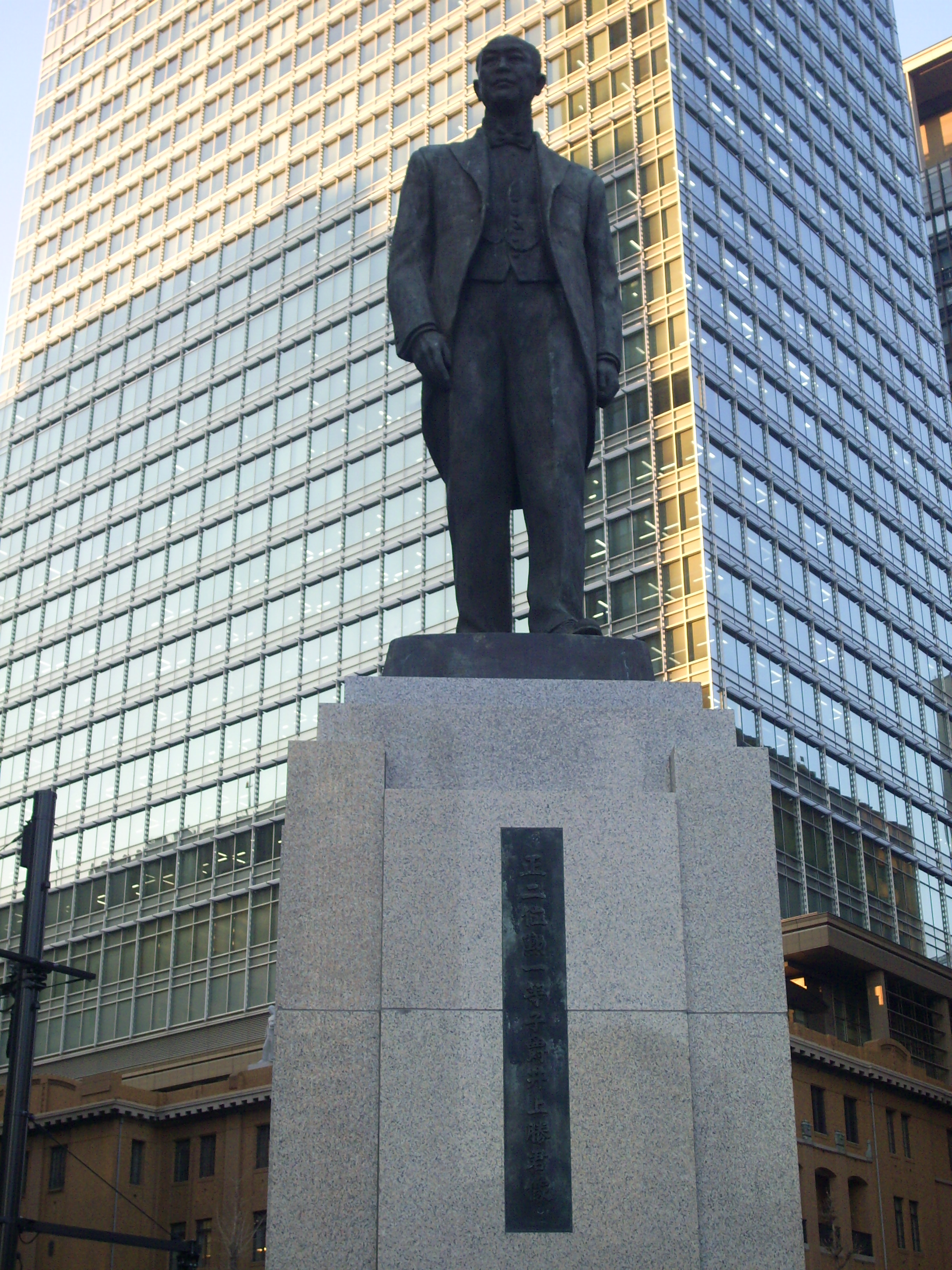 2017年12月7日にリニューアルした東京駅丸の内駅前広場に建立された井上勝の銅像 ㊟カメラを起動すると日付機能が出荷時のものに初期化されるため、ファイル履歴の撮影日時とメタデータの原画像データの生成日時が異なります